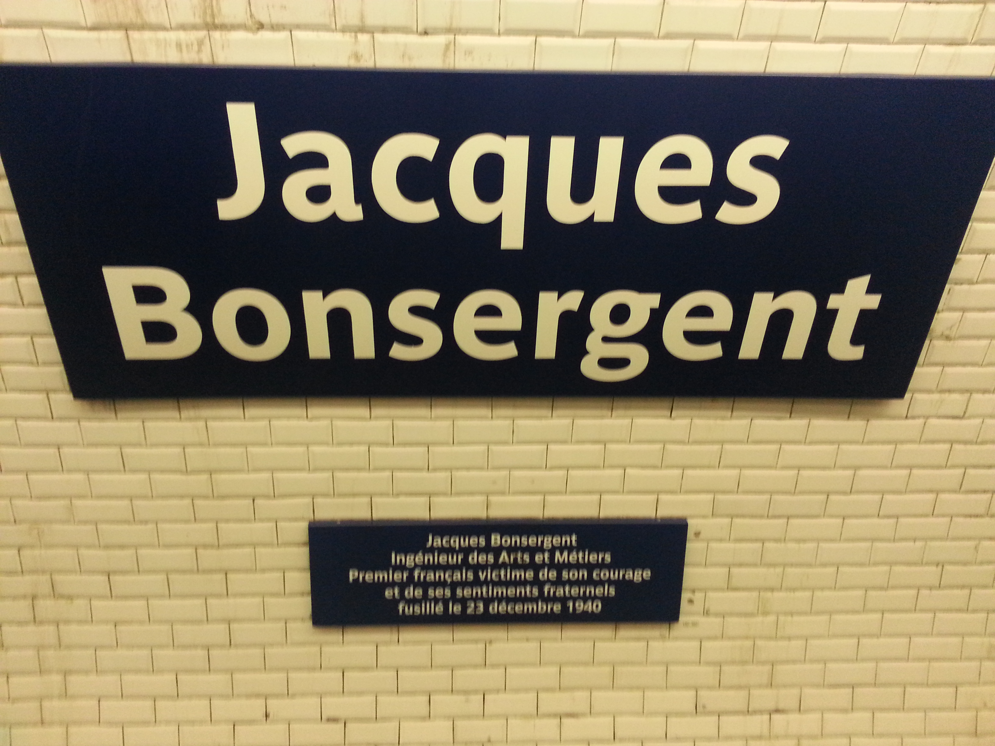 Panneau de la station de métro parisienne Jacques Bonsergent